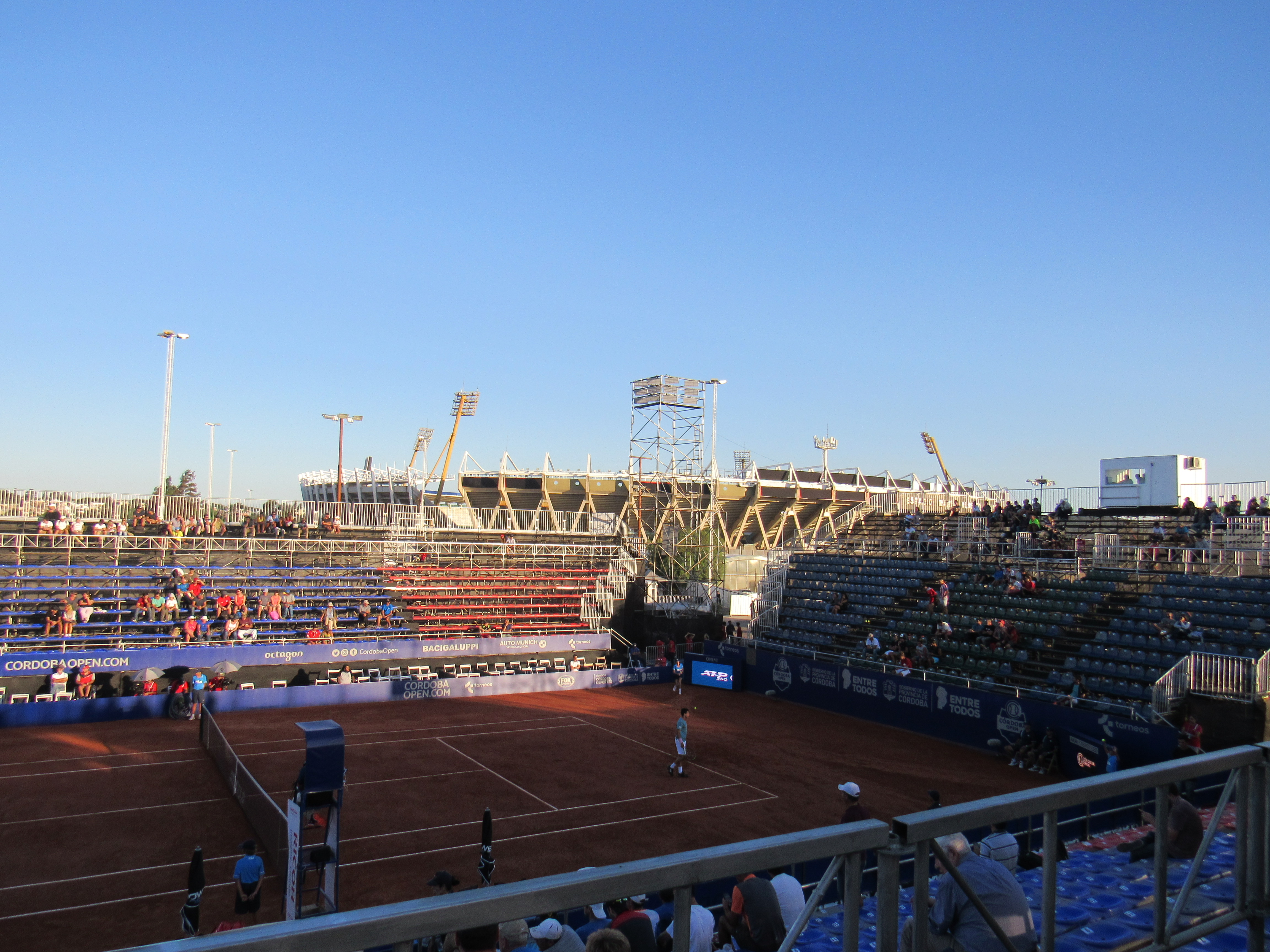 Cancha Central - ATP 250 Córdoba Open 2019, Primera Ronda del Cuadro Principal - Predio del estadio Mario Alberto Kempes